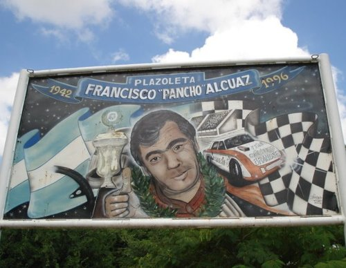 Cartel Mural erigido por la Peña "Cumelén Rucá" en homenaje a su piloto "Pancho" Alcuaz en la plazoleta que lleva su nombre.